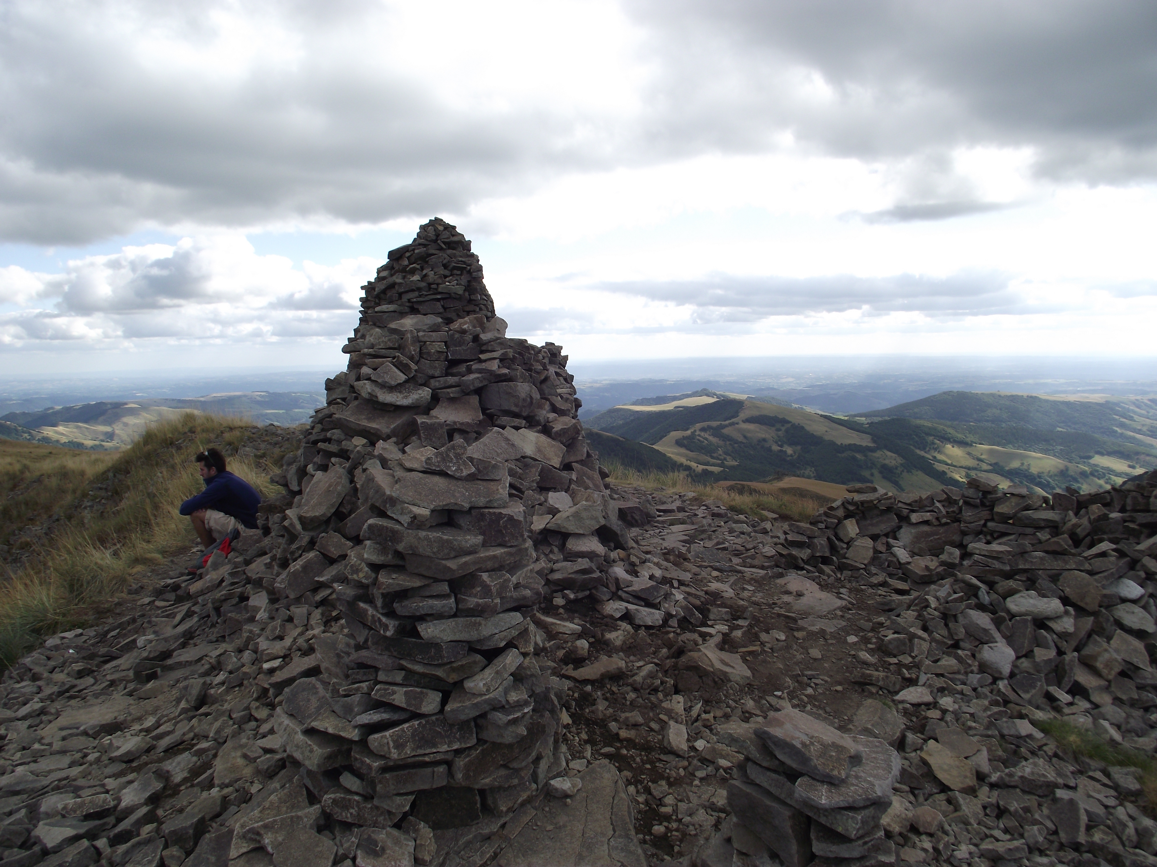 Cairn au sommet du puy Chavaroche (1739 m) dans les monts du Cantal.